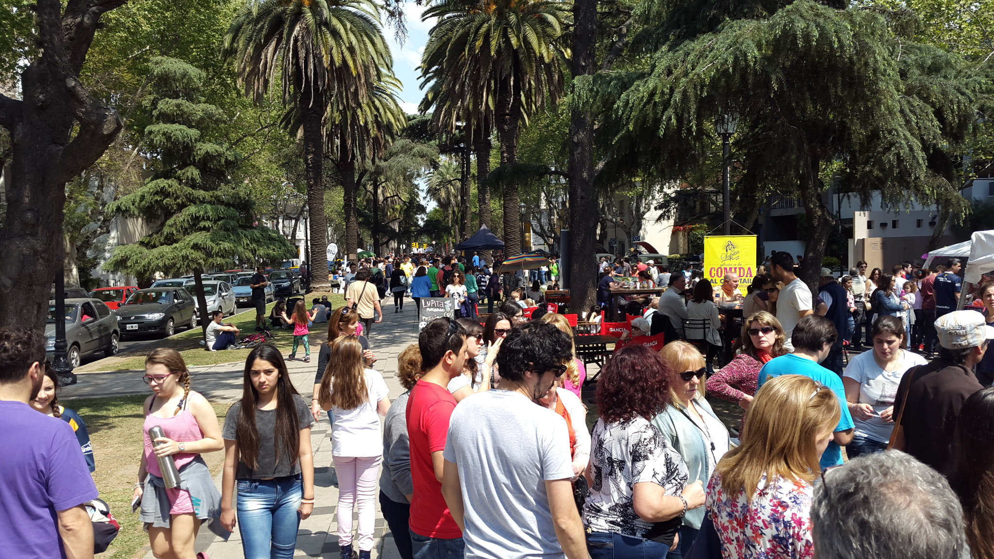 Street Food Rosario sobre Bv Oroño